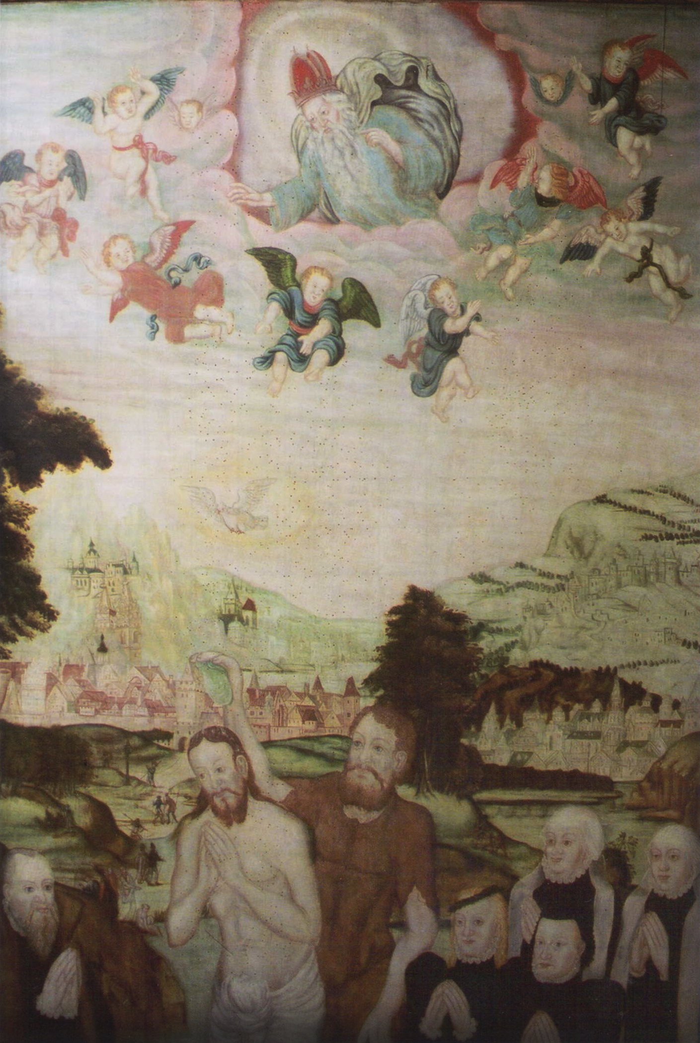 Detailaufnahme, Epitaph derer von Pfuel, um 1550, aus dem Altarraum der St. Johanniskirche, Bad Salze (Bad Salzelmen), Sachsen-Anhalt.